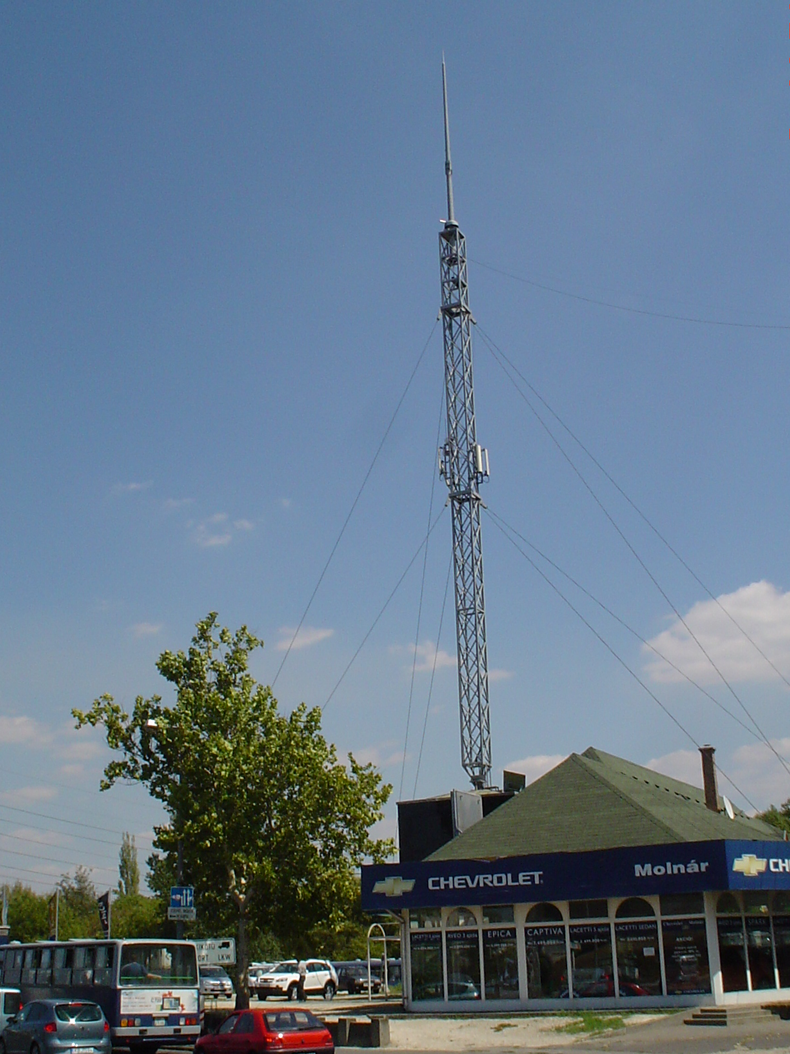 Monumento_pri_sparkotelegrafo en Budapeŝto.